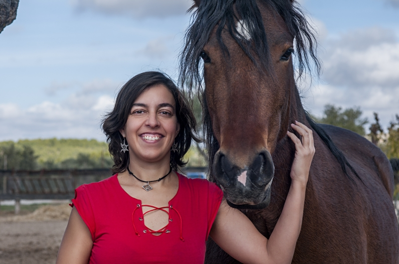 Fotografía de Loli Alcarria